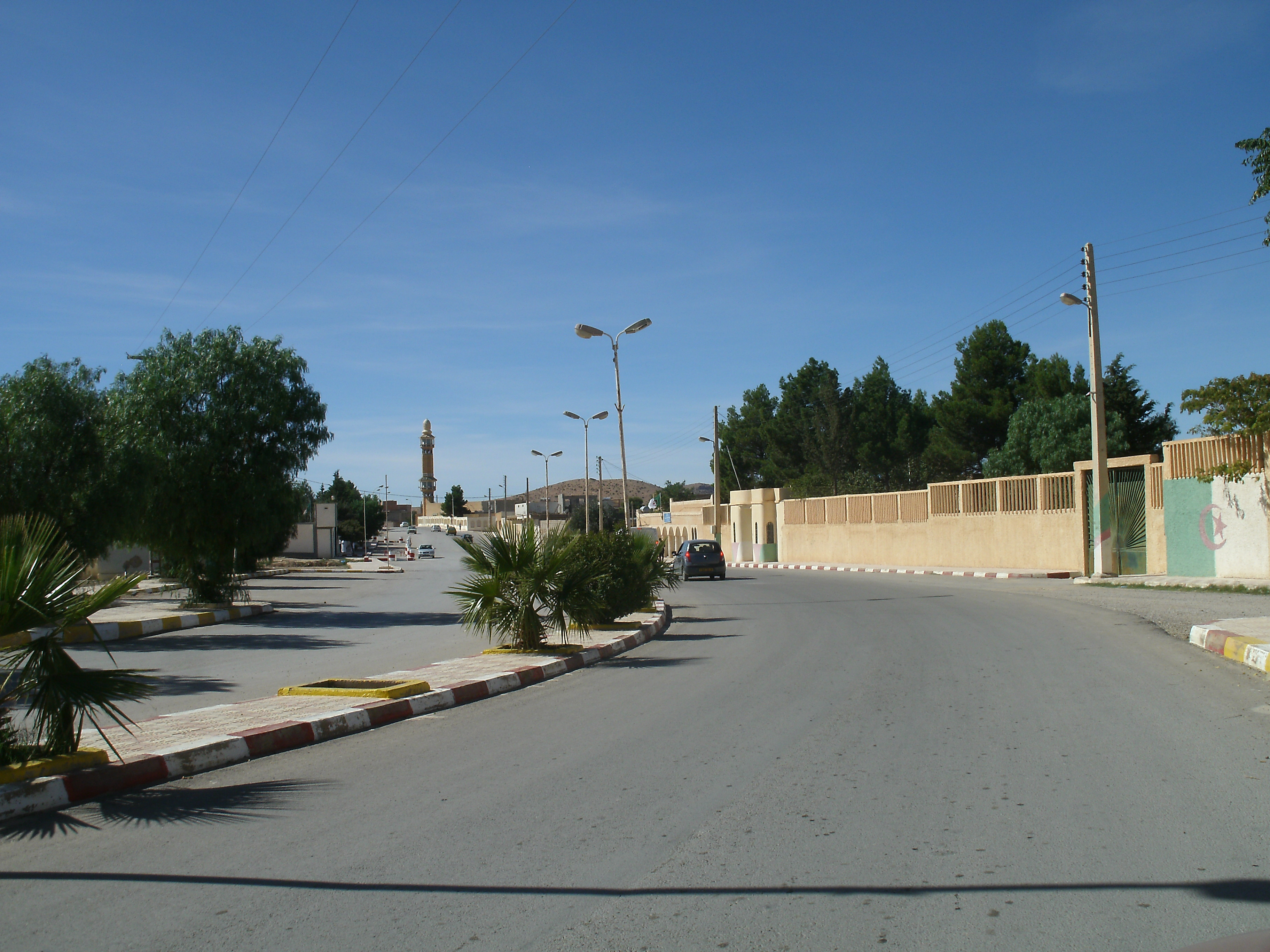 La rue principale de Djebel Messaad